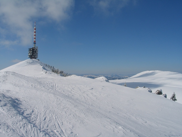 Le Chasseral en hiver. Auteur: Delley Sébastien